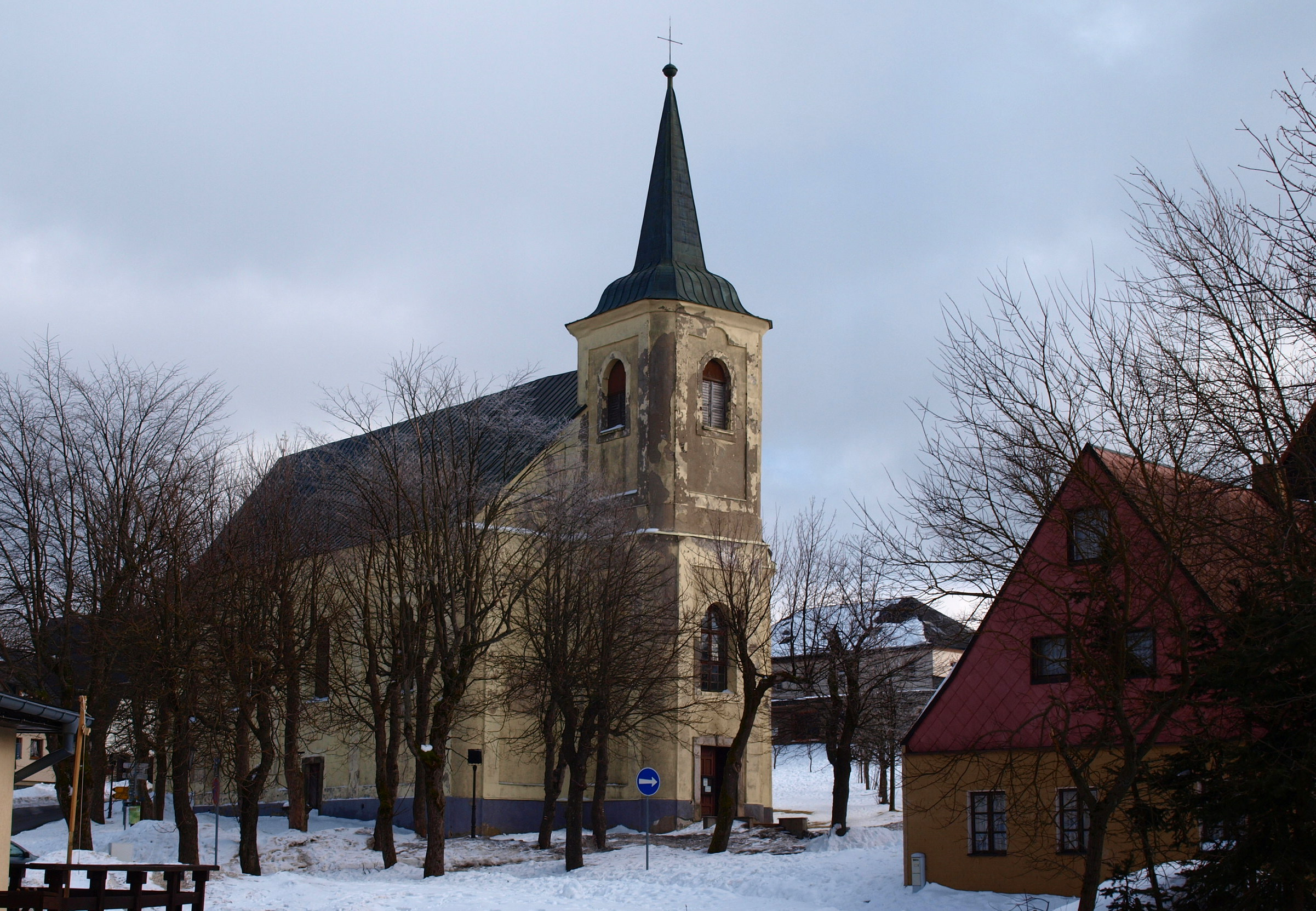 Boží Dar